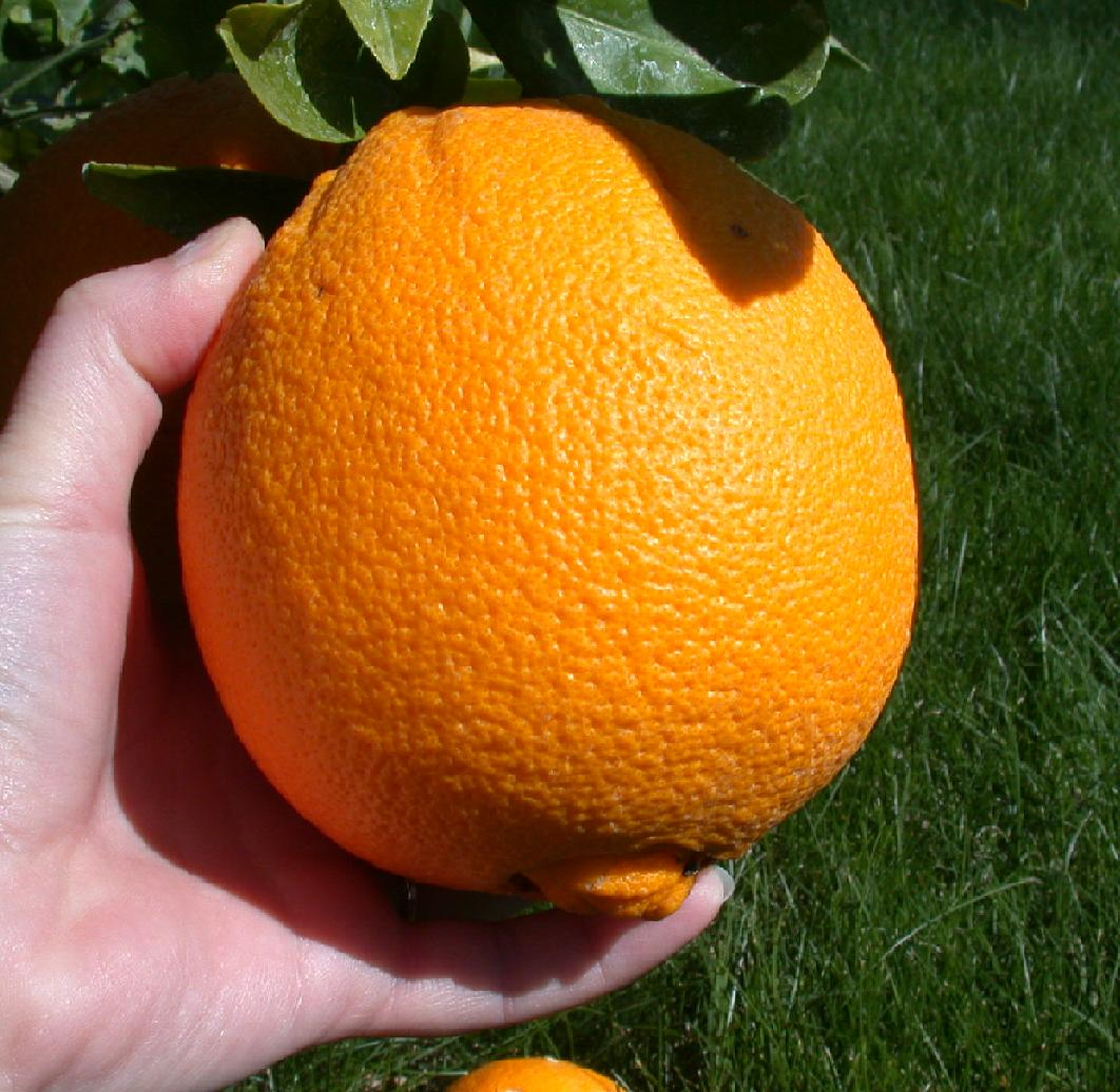 Picking an orange.